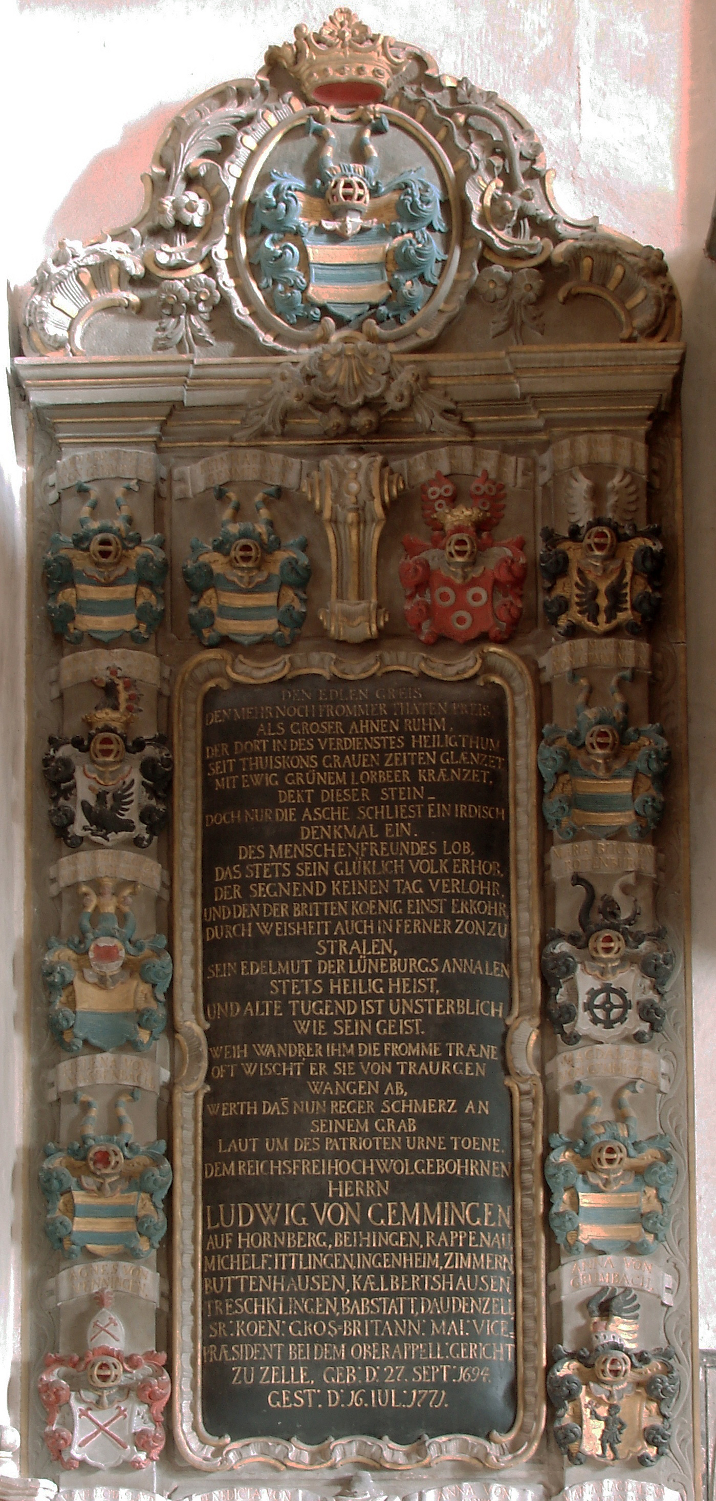 Freiberg am Neckar, Germany, Amandus Church, epitaph of Ludwig von Gemmingen (1694–1771).